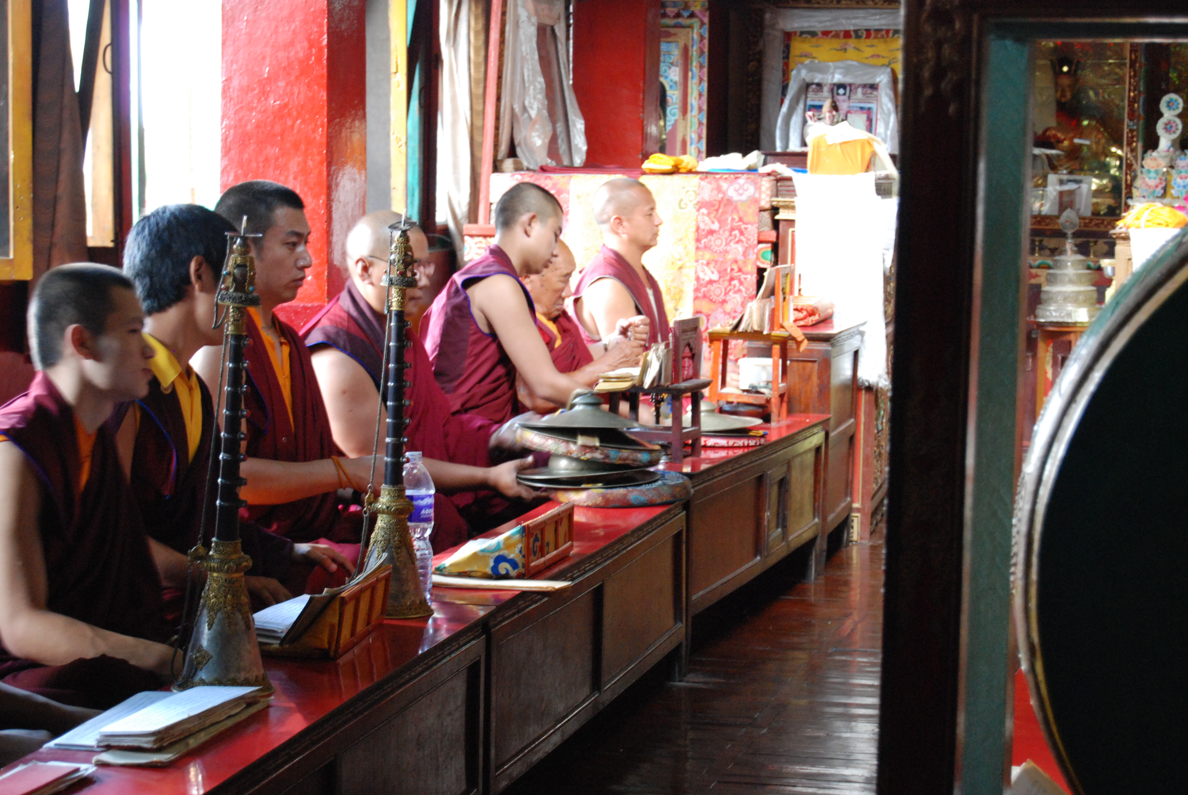 0823 lamas